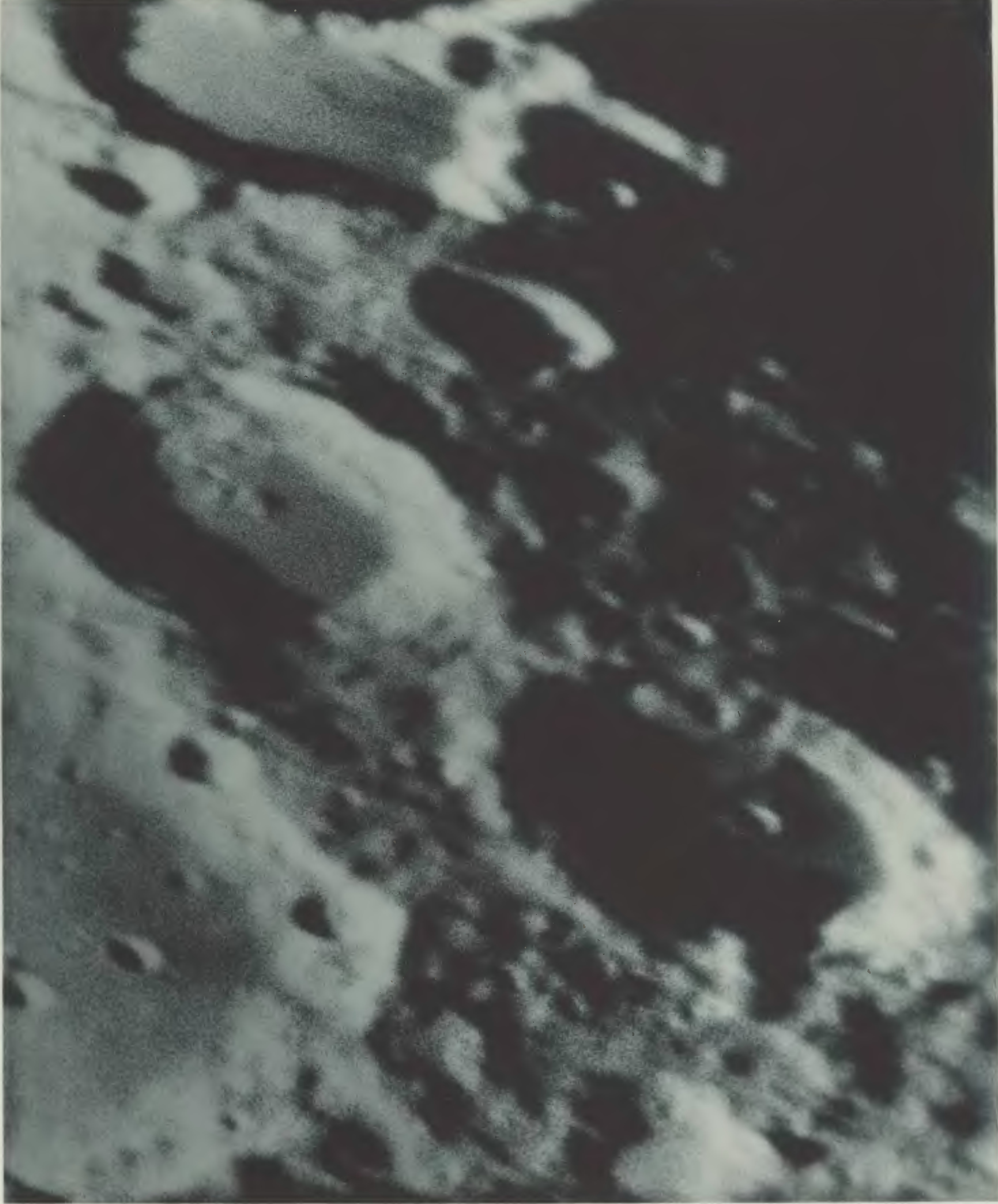 Photographischer Mond-Atlas vornehmlich auf Grund von focalen Negativen der Lick-Sternwarte im Massstabe eines Monddurchmessers von 10 Fuss ausgeführt von Professor Ladislaus Weinek. Heft VIII. Tafel 159